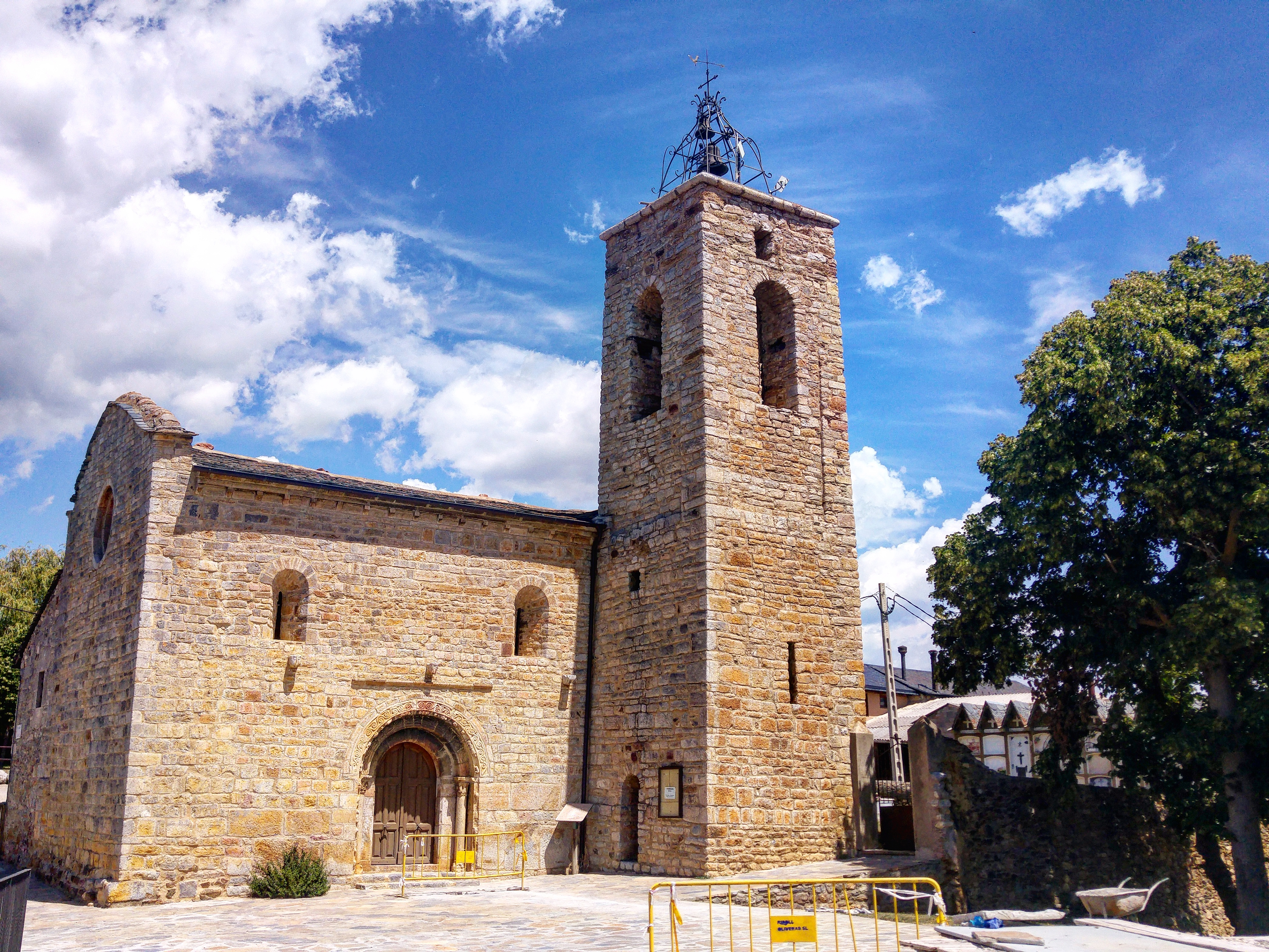 Santa Maria d'All, ubicada al poble d'All, municipi d'Isòvol, Baixa Cerdanya